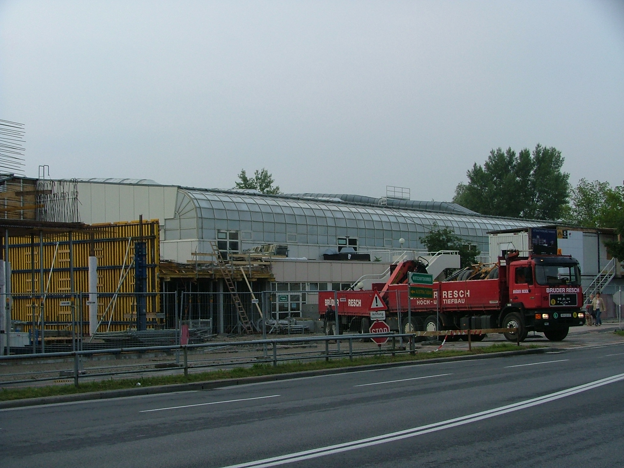 Linzer Eissporthalle, Heimat der Black Wings Linz